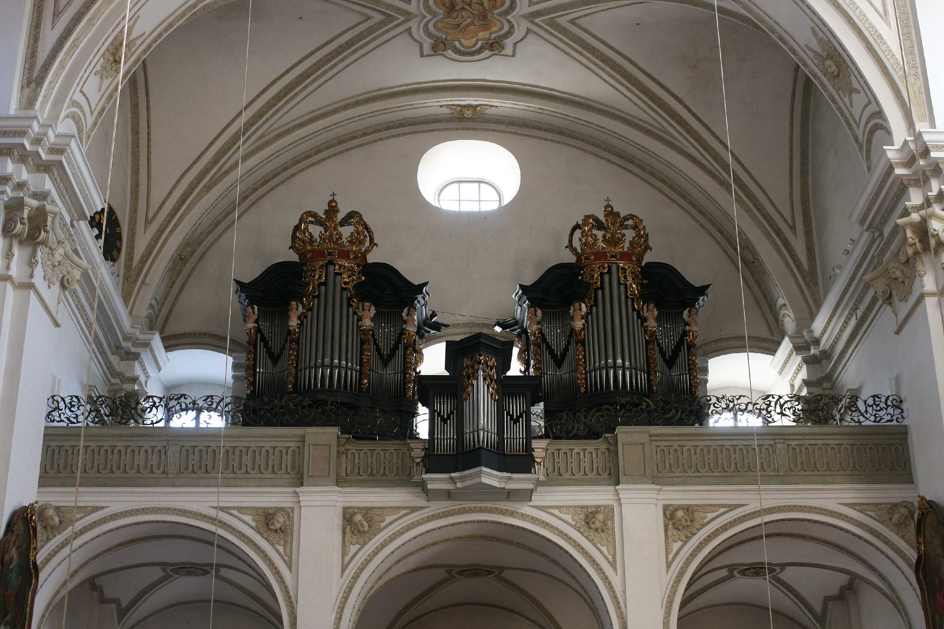 Die Orgel der Steyrer Michaelerkirche